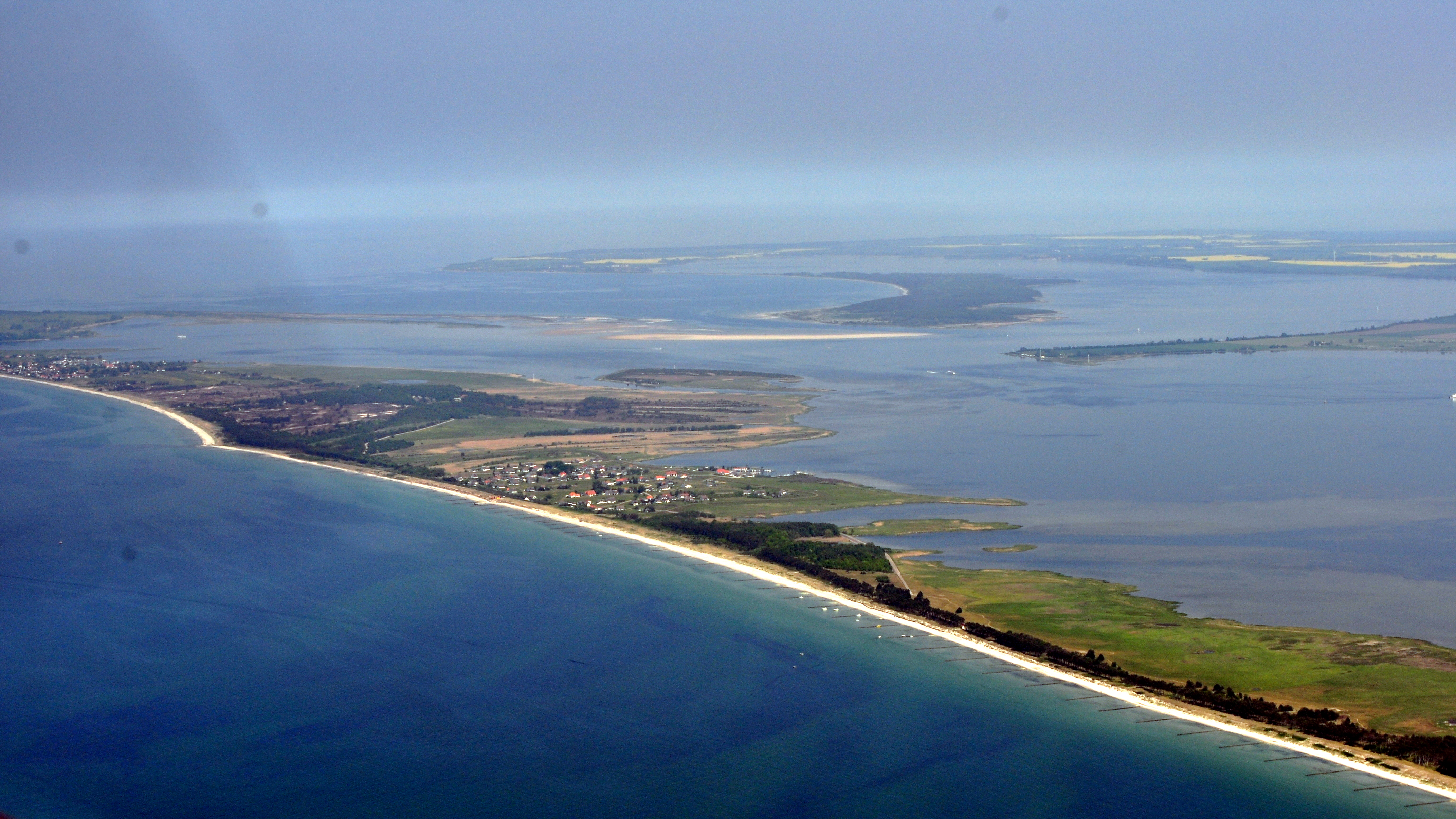 Die Bilder wurden von mir während eines einstündigen Rundflugs ab Flugplatz Güttin am 21. Mai 2011 aufgenommen. Die Bildbeschreibung steht im Dateinamen. Aufgenommen mit einer Nikon D5000 durch das Seitenfenster des Flugzeugs.